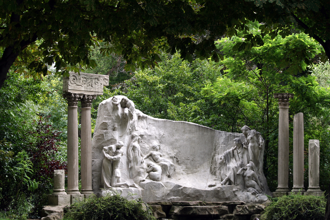 Le Rêve du Poète. Monument à Alfre de Musset (1910) par Alphonse Moncel dans le Jardin de la vallée suisse, Place du Canada à Paris